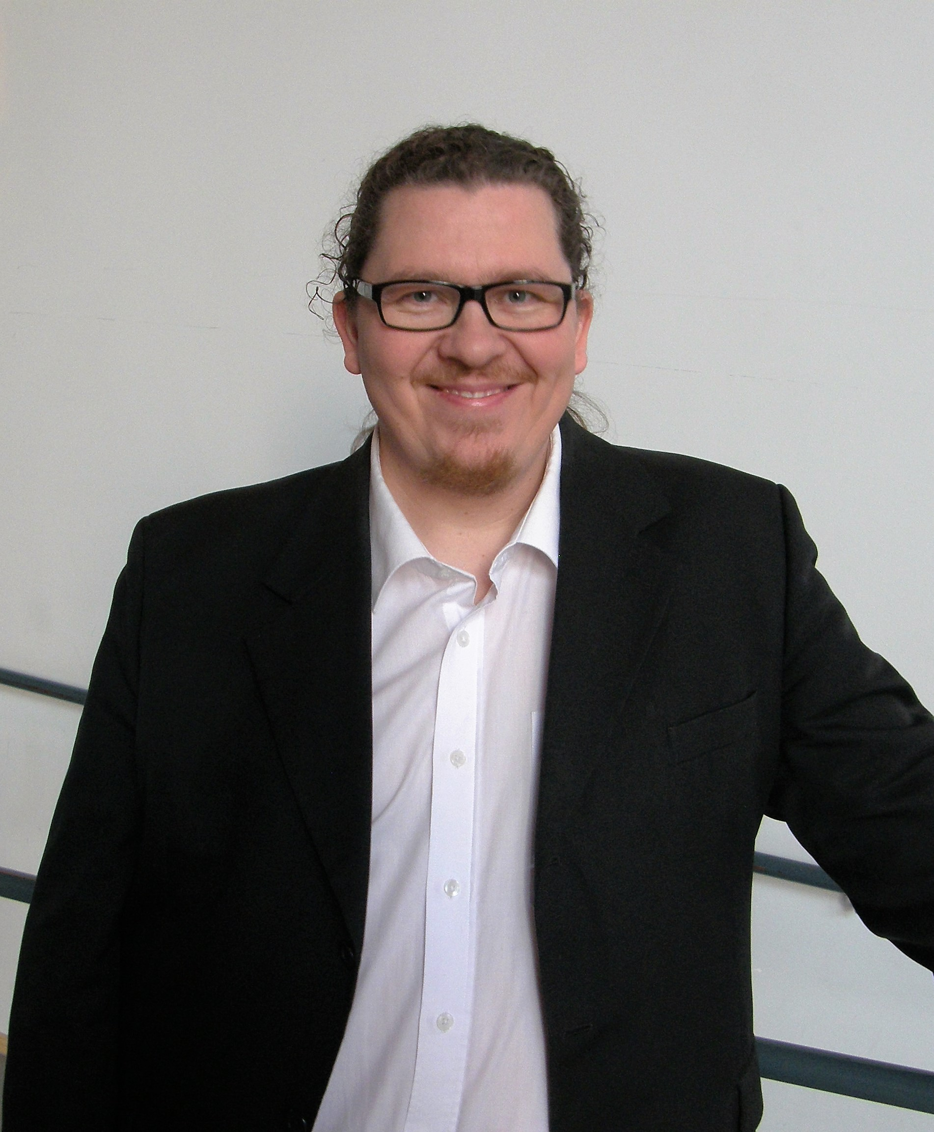 Laulaja Aki Hietala.